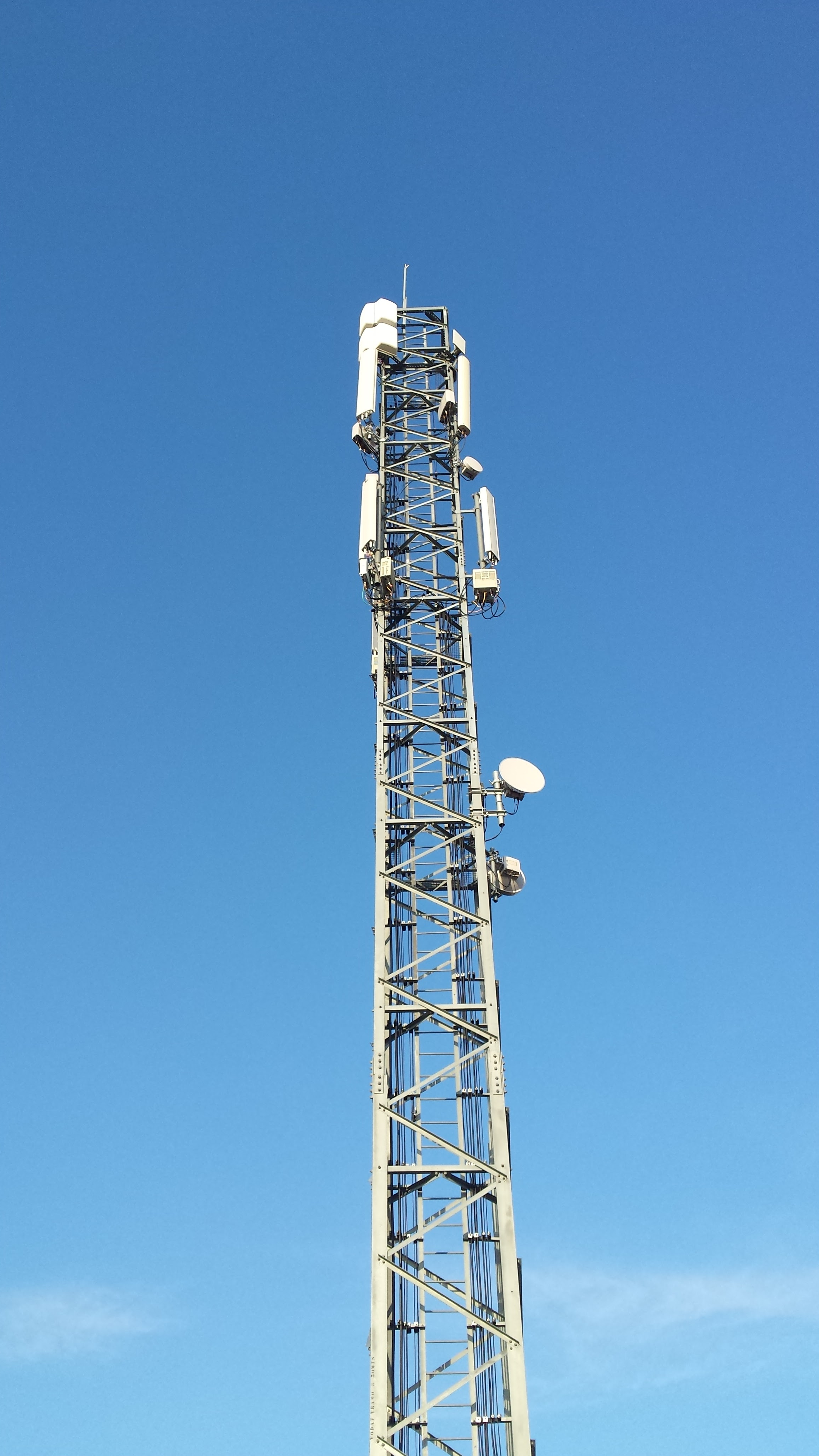 antena vodafone